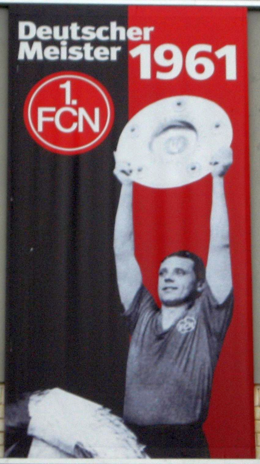 Flag of 1. FC Nürnberg at the Valznerweiher, Nürnberg.